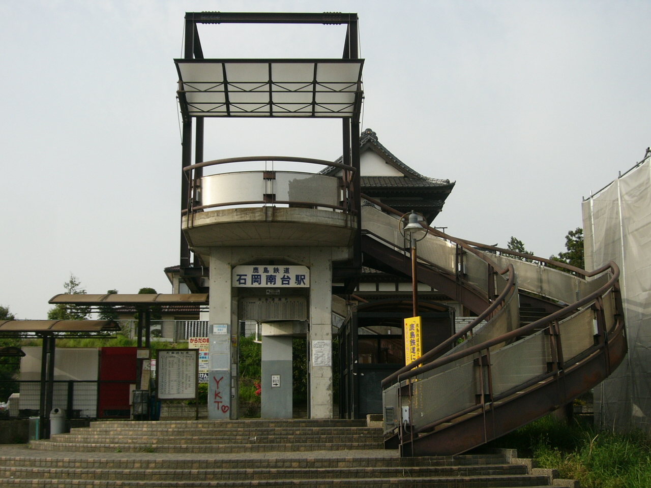 Ishiokaminamidai Station